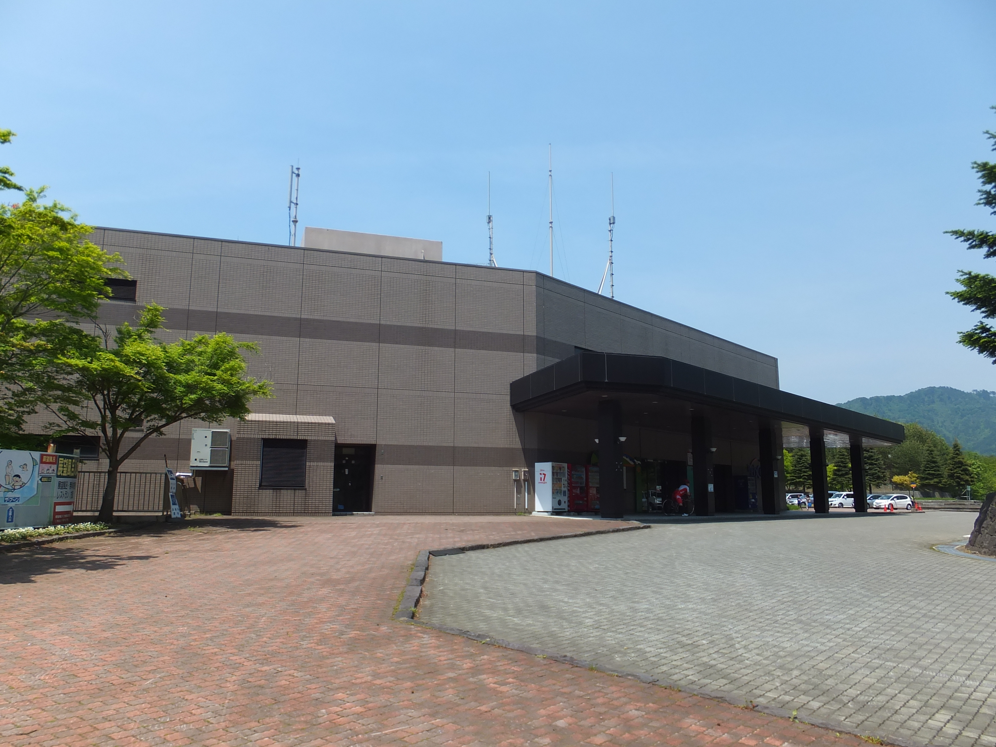 太平山リゾート公園内にある屋内プール・温泉施設「クアドーム ザ・ブーン」。1991年竣工、1997年増築